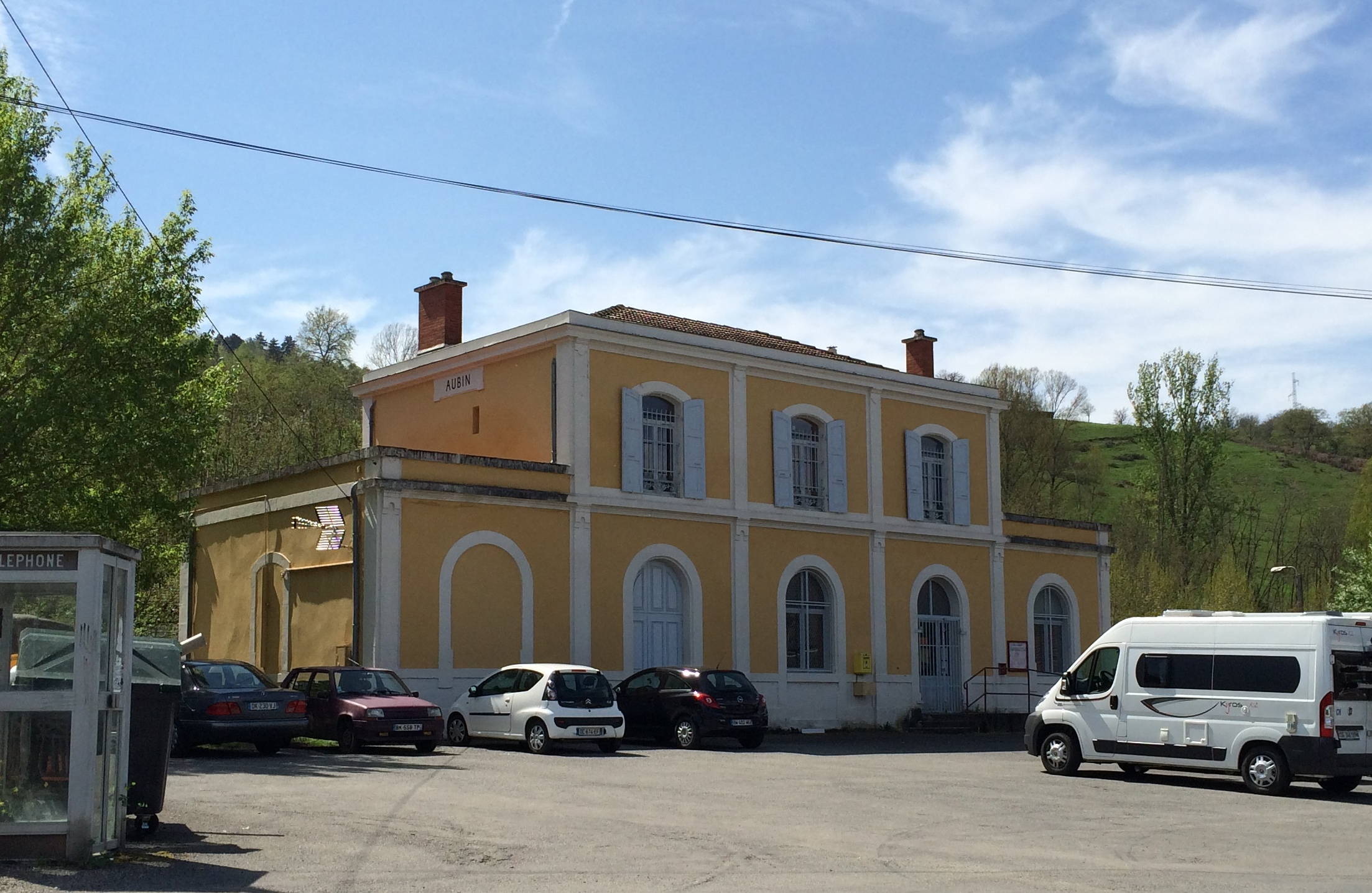 SNCF Bahnhof in Aubin, Frankreich